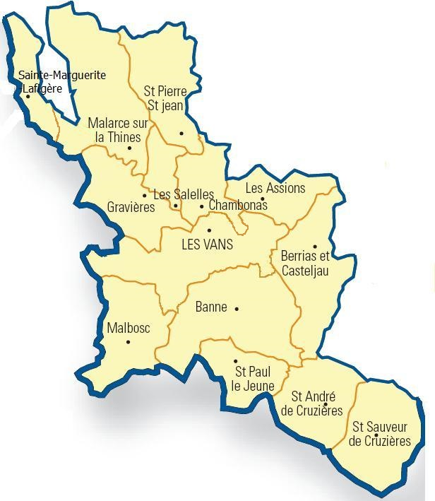 Carte détaillée des communes du canton des Vans (Ardèche)